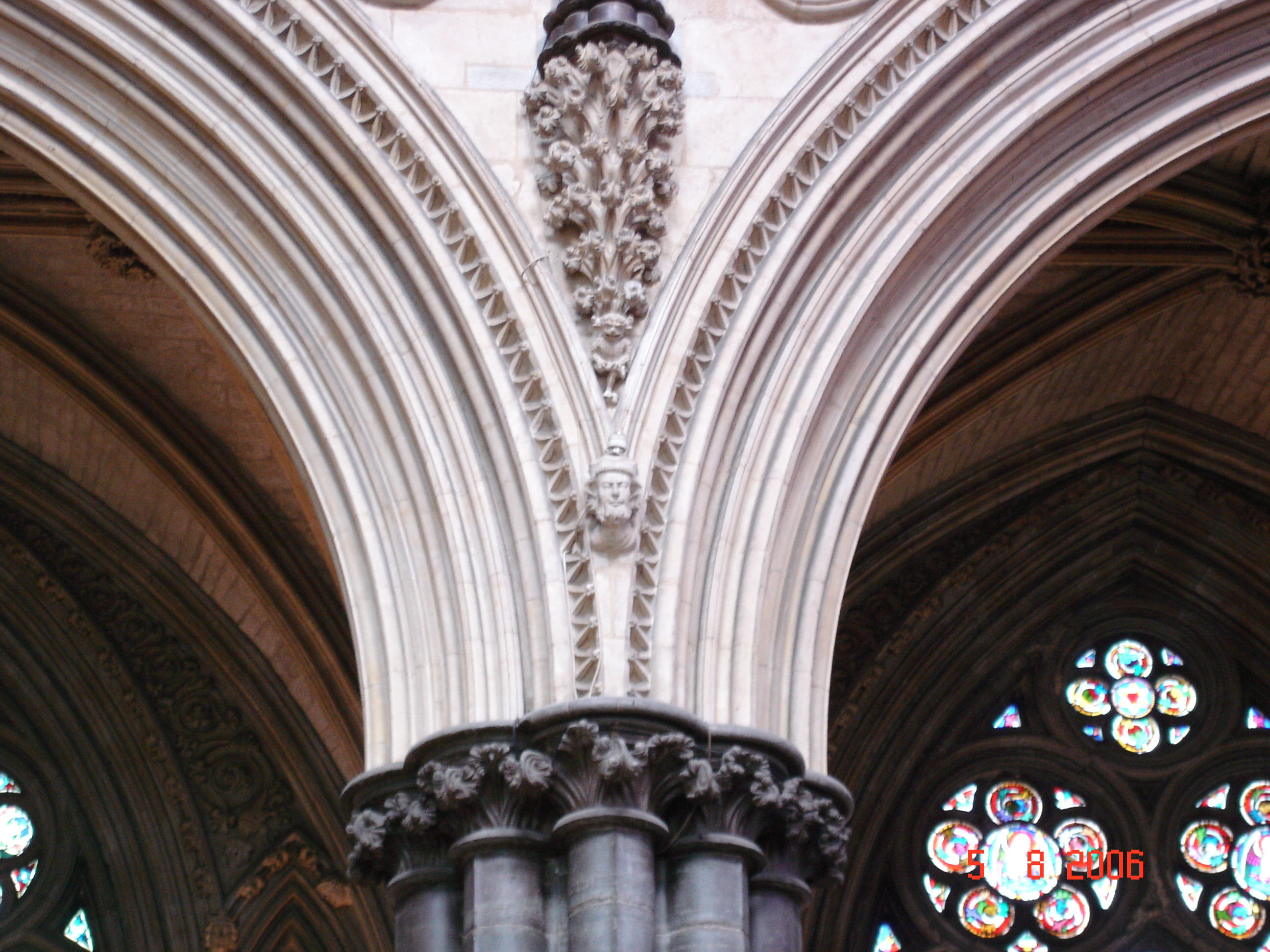 Lincoln Imp